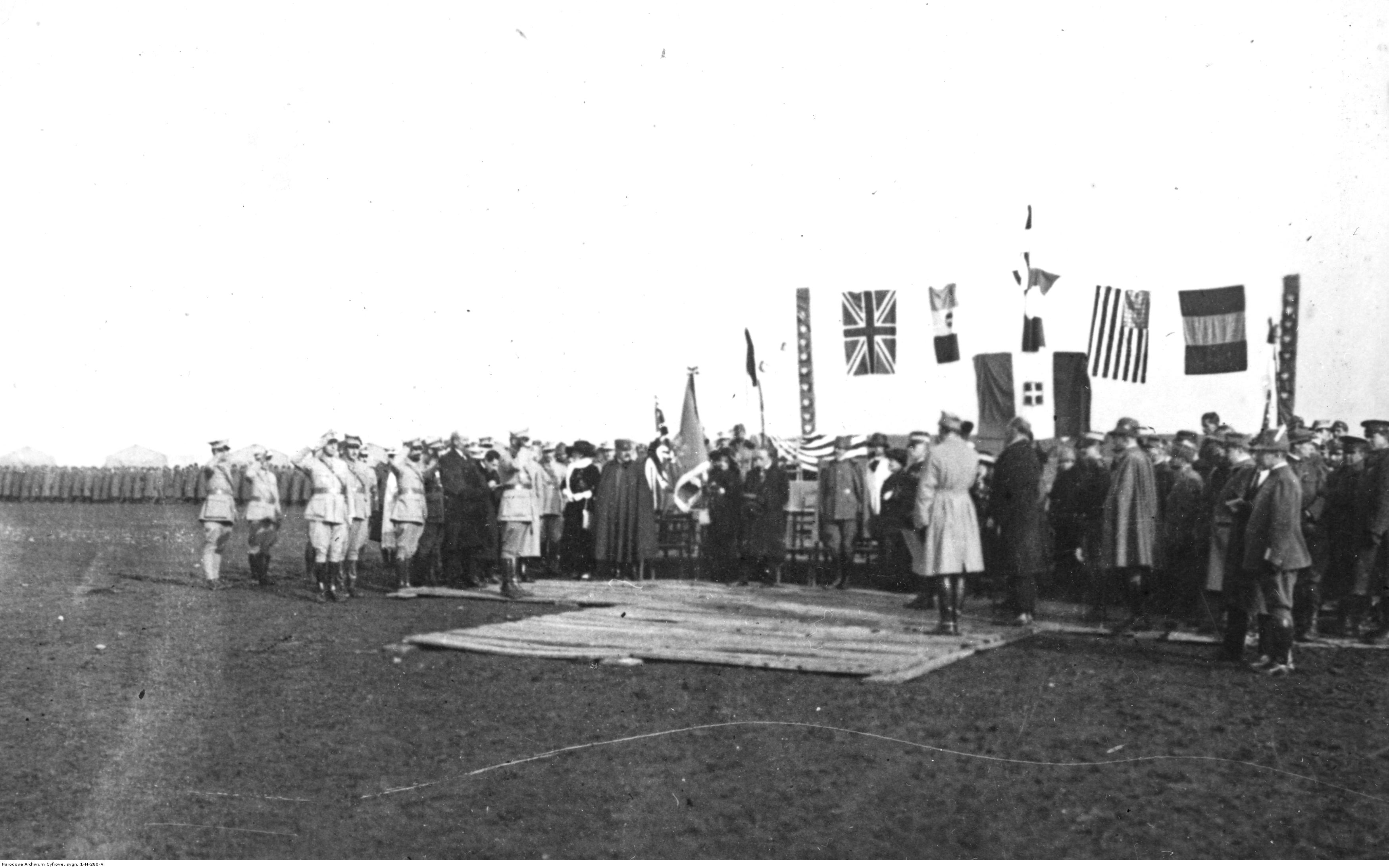 Polski obóz wojskowy w La Mandria di Chivasso - uroczystość wręczenia sztandaru w imieniu miasta Turyn pułkowi im. Adama Mickiewicza. Koncern Ilustrowany Kurier Codzienny - Archiwum Ilustracji. Sygnatura: 1-H-280-4